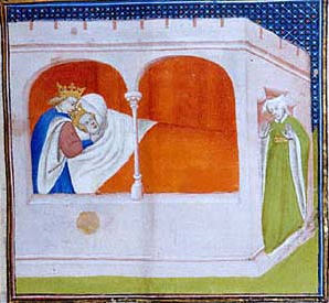 Chilperic s Galswinthou a Fredegundou u dveří